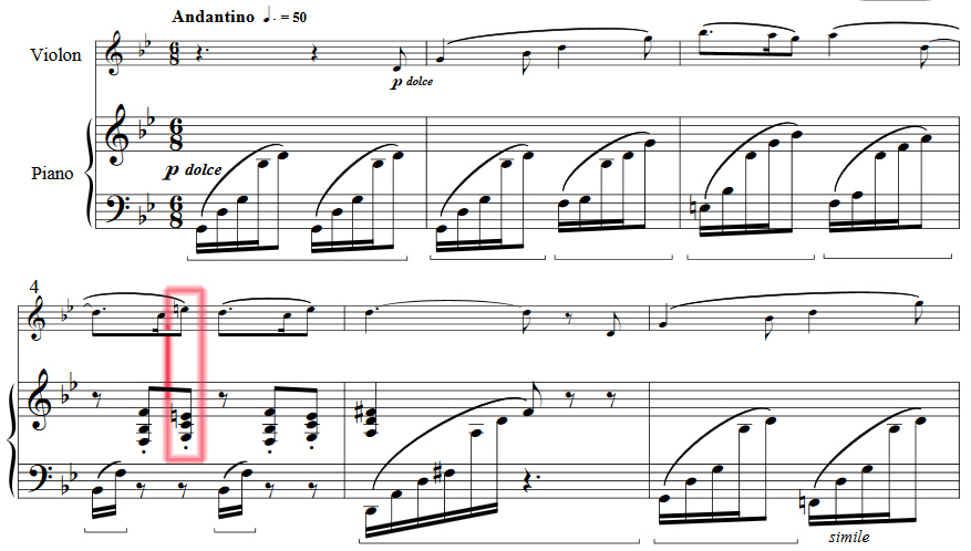 Форе. Сицилиана для скрипки и фортепиано (начальные такты). Пример модализма